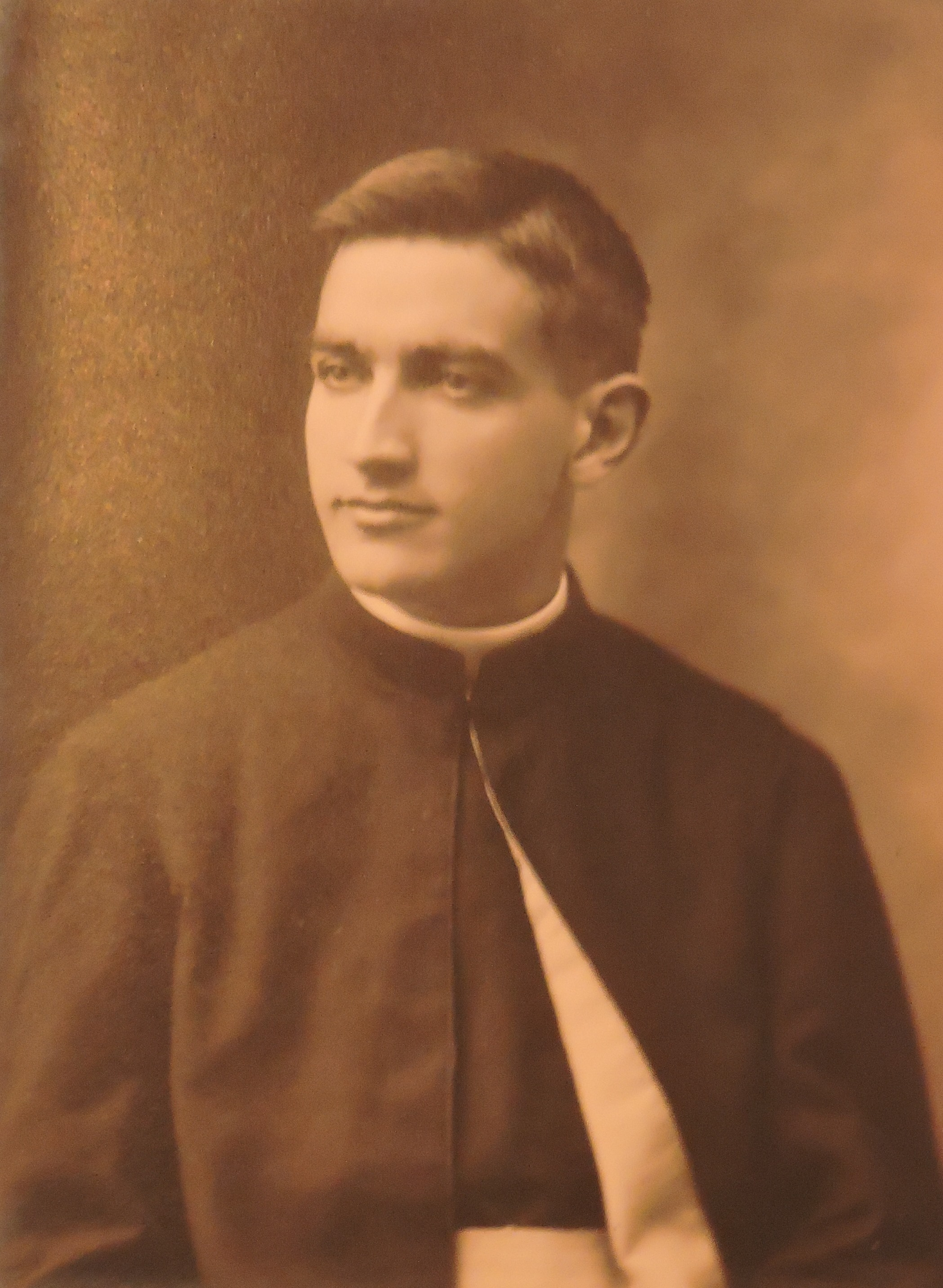 Dom Manuel no período de seminário.